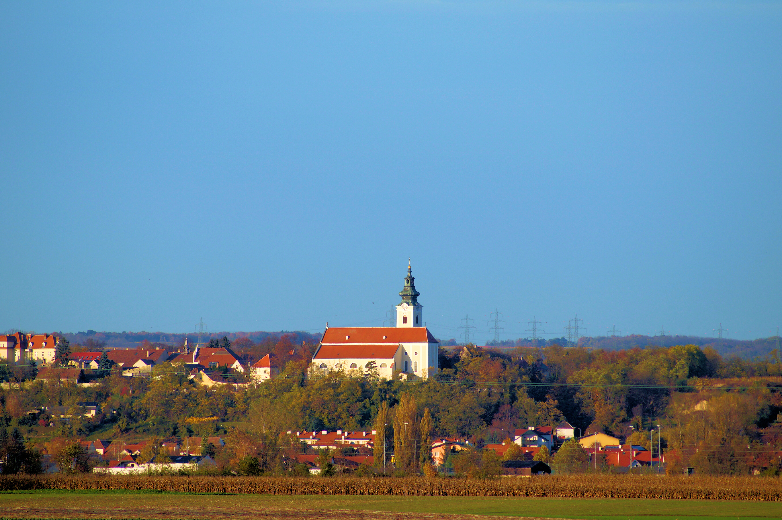 Kirchberg - Pfarrkirche hl. Stephan - Blick von Ferne